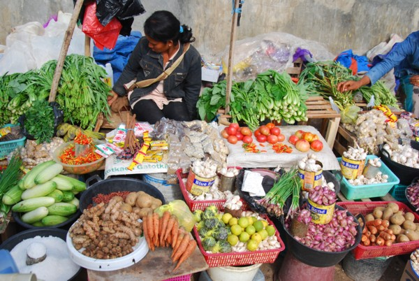 Baa Market, Rote island, East Nusa Tenggara province, Indonesia